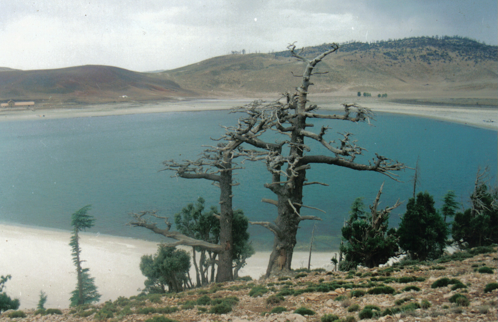 image personnelle